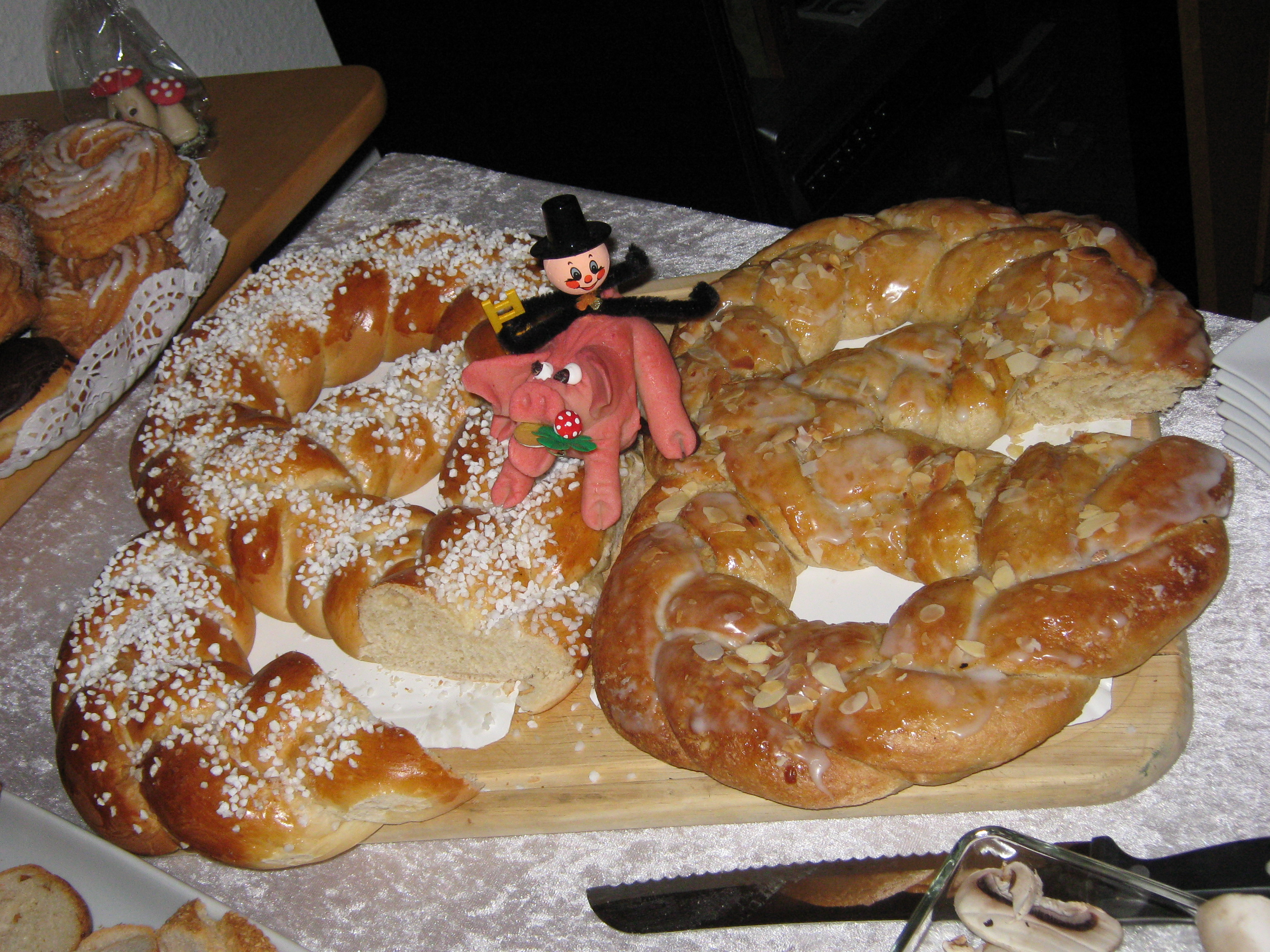 Neujahrsbrezel